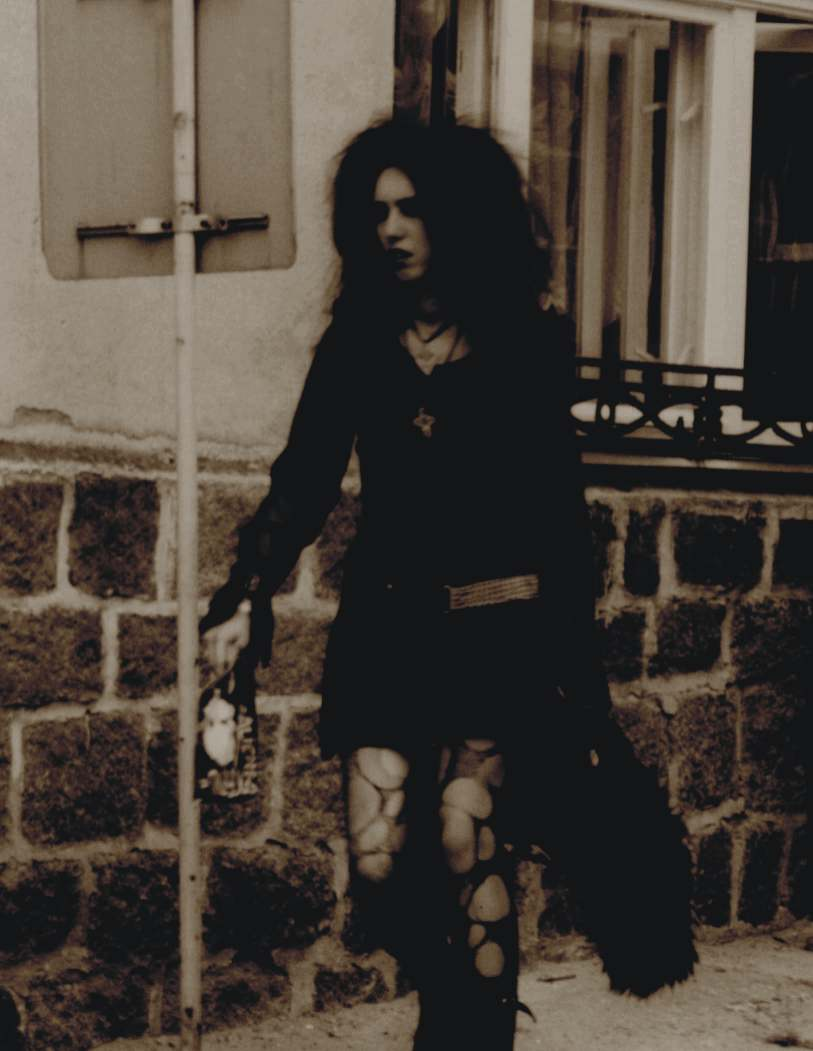 Gotka na Castle Party